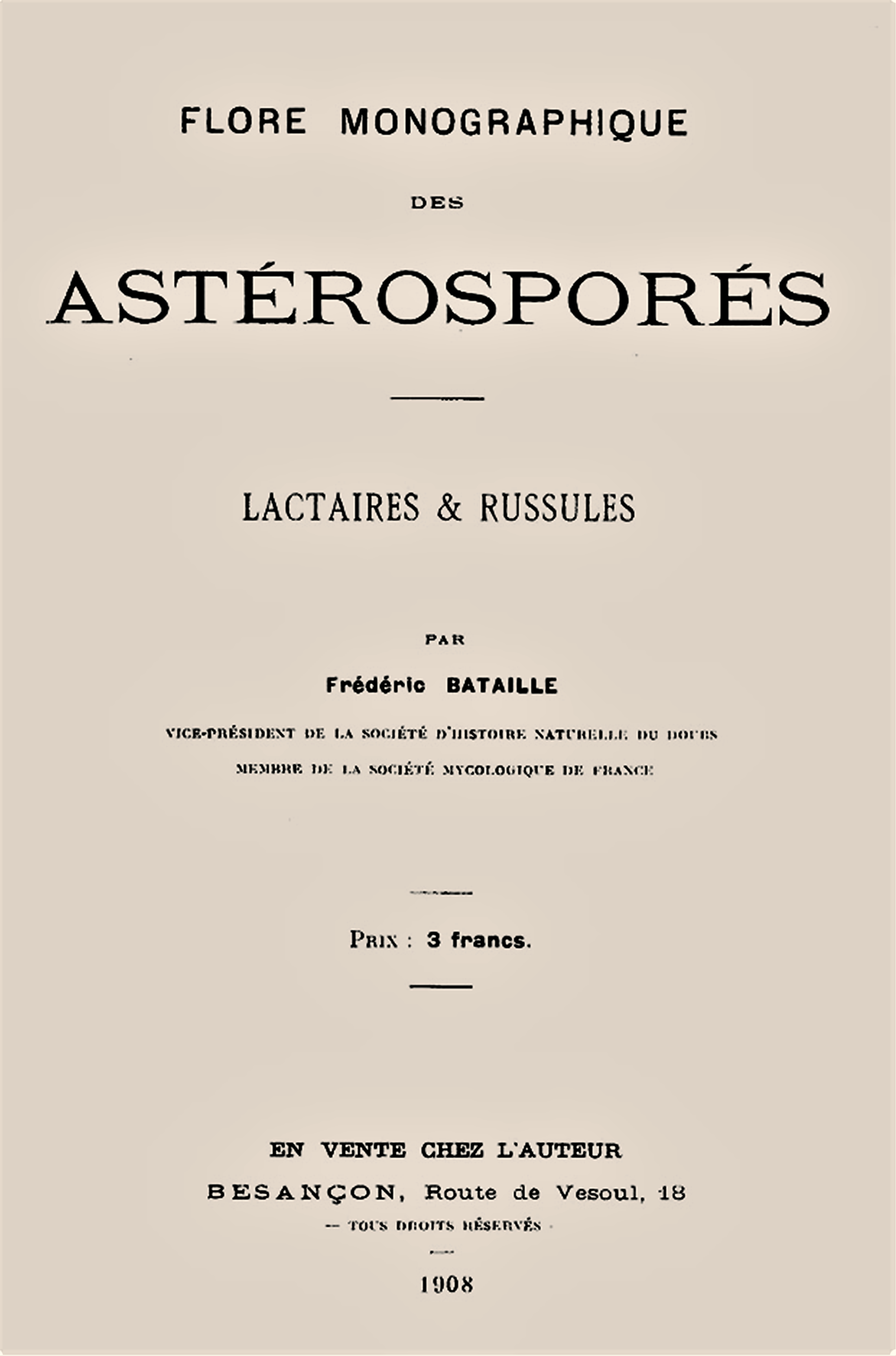 Frédéric Bataille - Flore monographique des Astérosporés – Lactaires & Russules, Selbstverlag, Besançon 1908